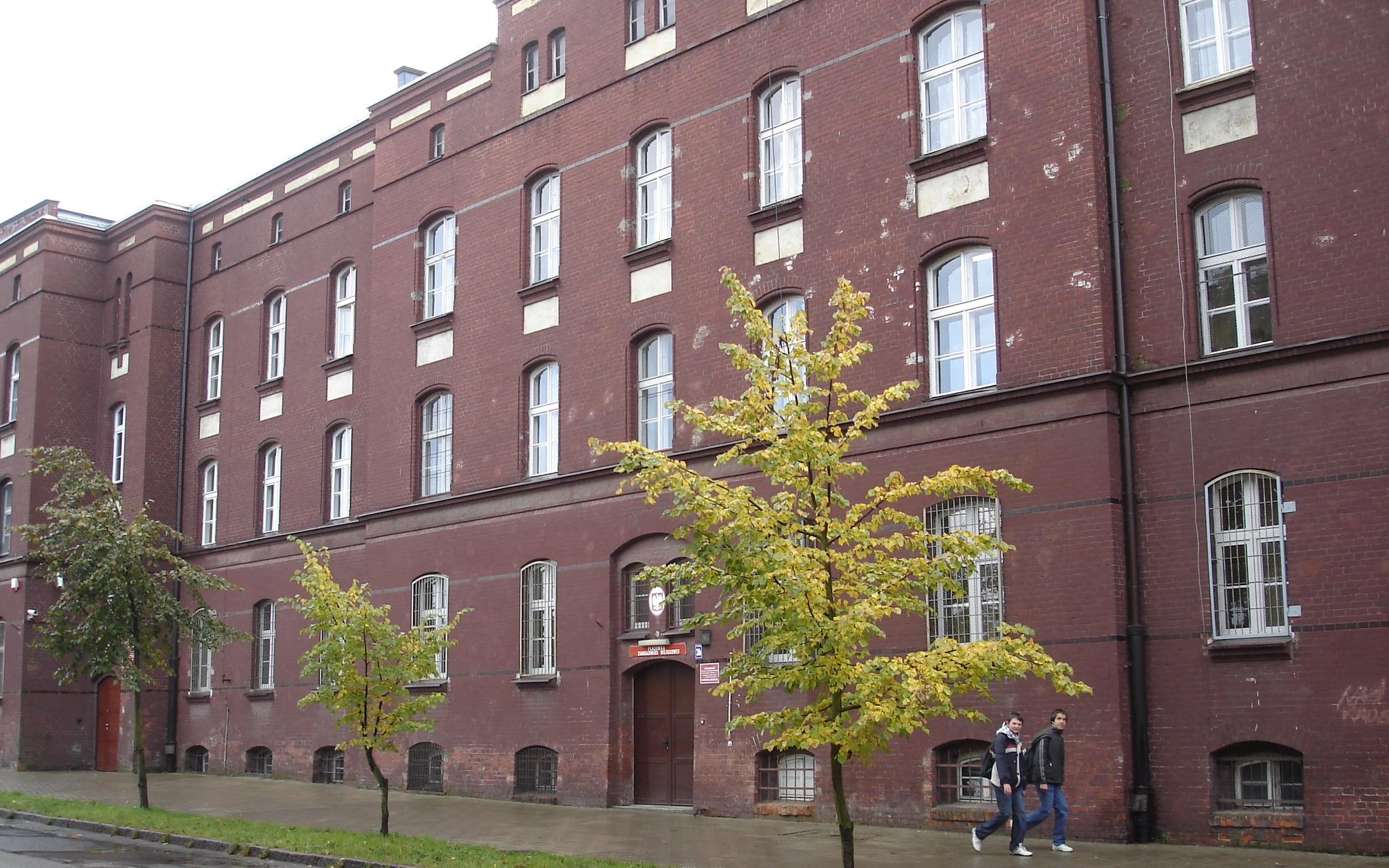 Żandarmeria Wojskowa w Stargardzie Szczecińskim